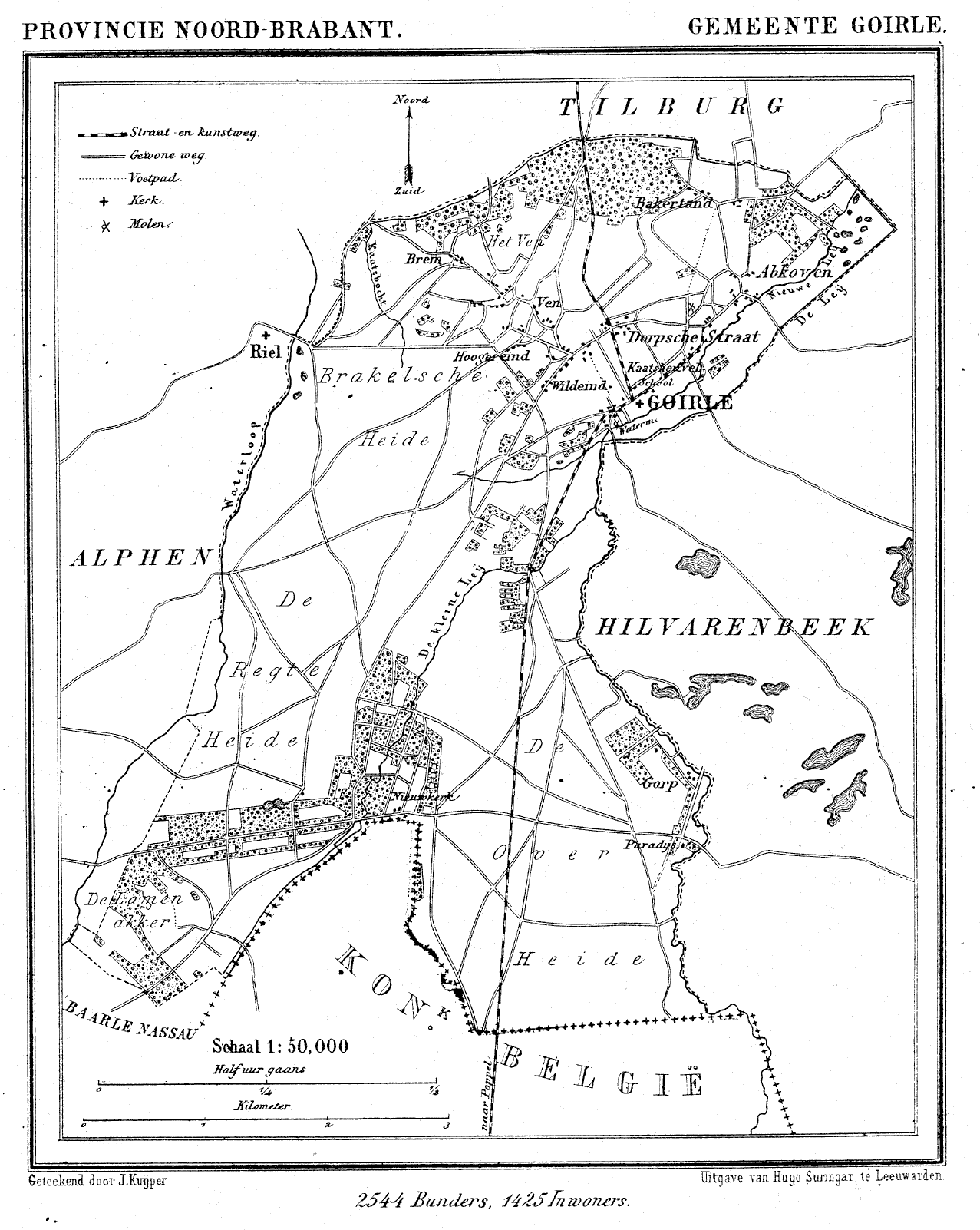 Nederland, Noord-Brabant, Gemeente Goirle